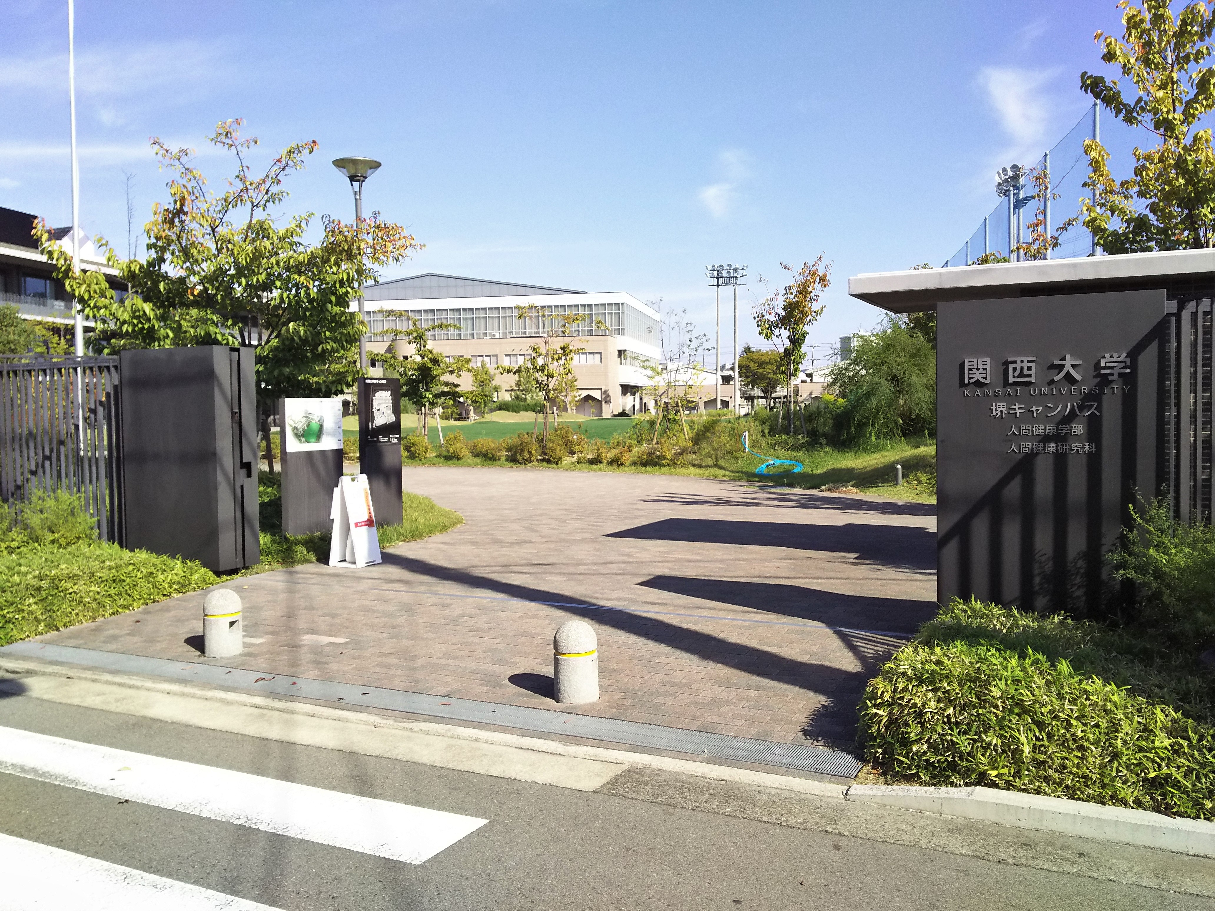 関西大学堺キャンパス（大阪府堺市）